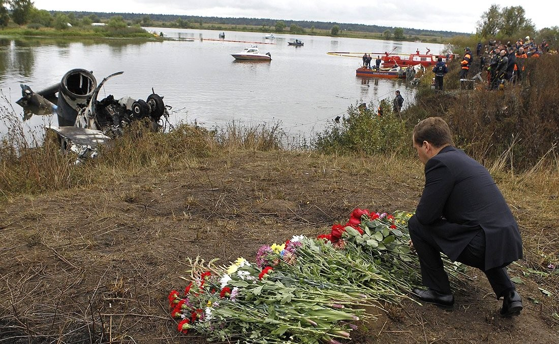 Дмитрий Медведев на месте крушения Як-42Д 8 сентября 2011 года